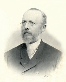 Josef Truhlář (1840 - 1914), Český knihovník a literární historik.